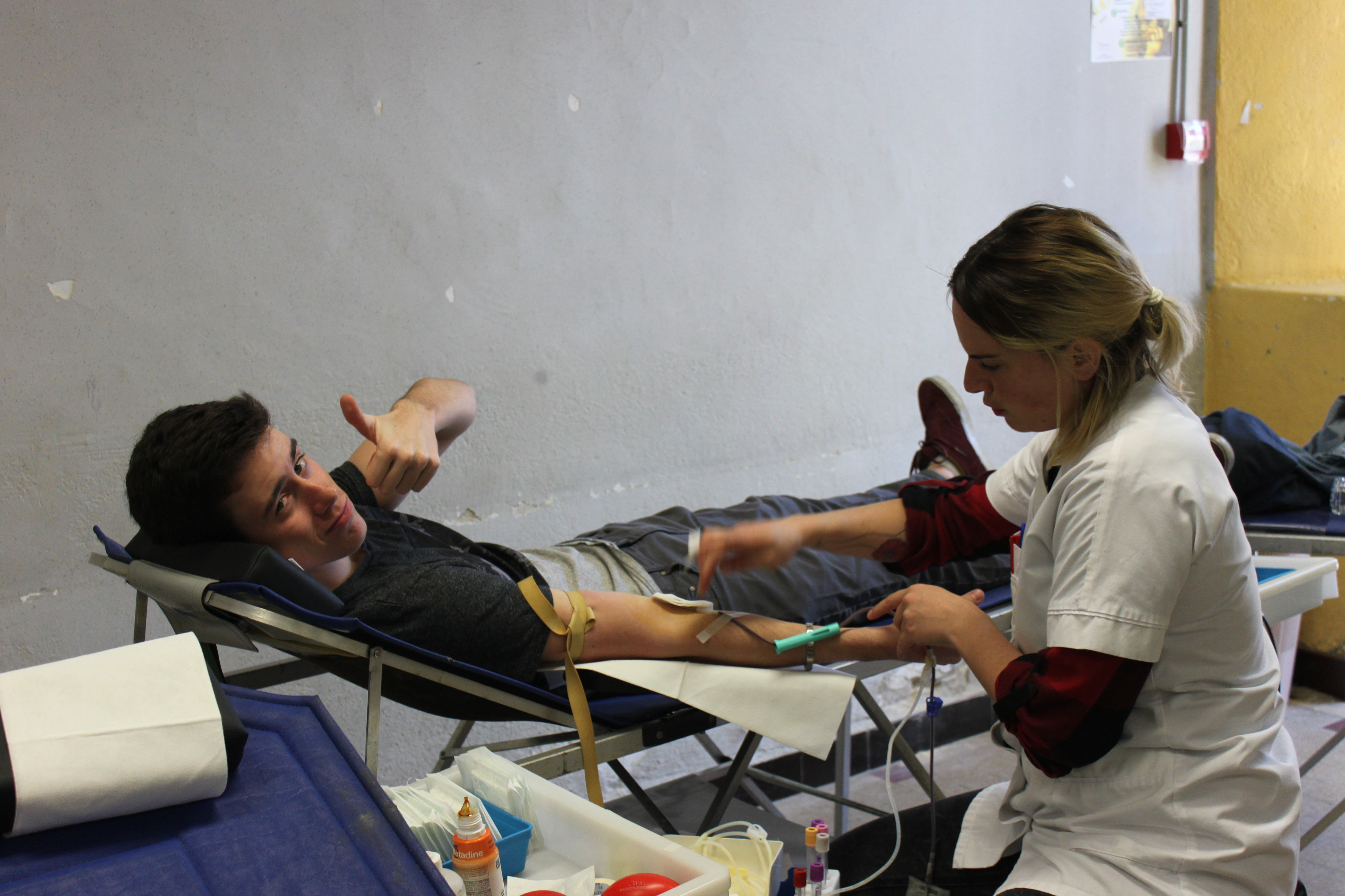 Étudiant donnant son sang lors d'une collecte au lycée Bonaparte de Toulon le 18 mars 2016